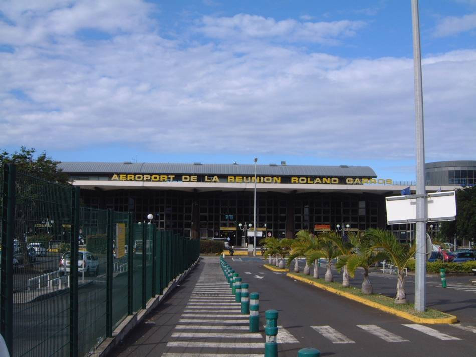 Photo prise par Nerijp en décembre 2005. Elle est libre de droit d'après cette page.